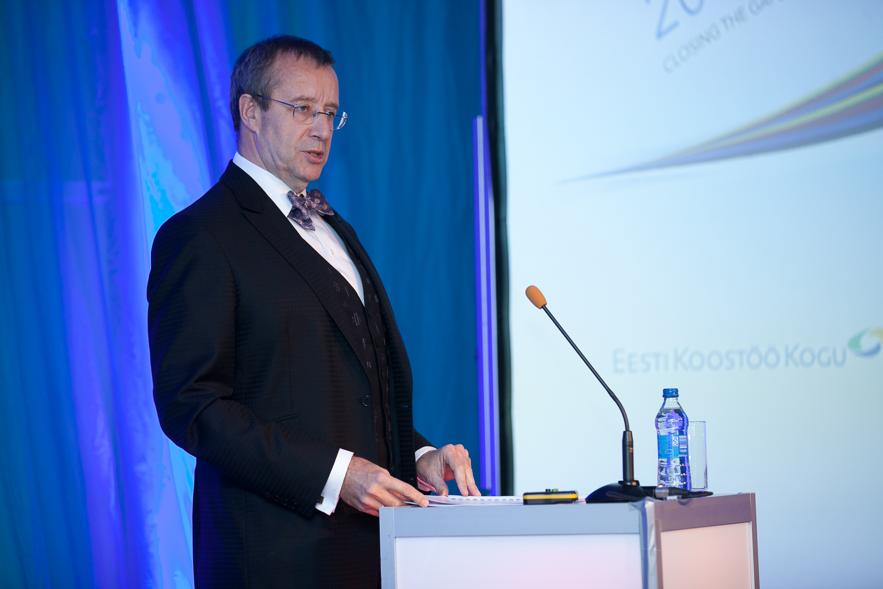 2011.gada 24.novembris. Saeimas priekšsēdētāja Solvita Āboltiņa piedalās konferencē Tallinā „Baltijas ceļš: pēc 20 gadiem. Atšķirību mazināšana Baltijas jūras reģionā”. Attēlā: Konferenci atklāj Igaunijas prezidents Tomass Hendriks Ilvess (Toomas Hendrik Ilves). Foto: Ernests Dinaka, Saeimas Kanceleja